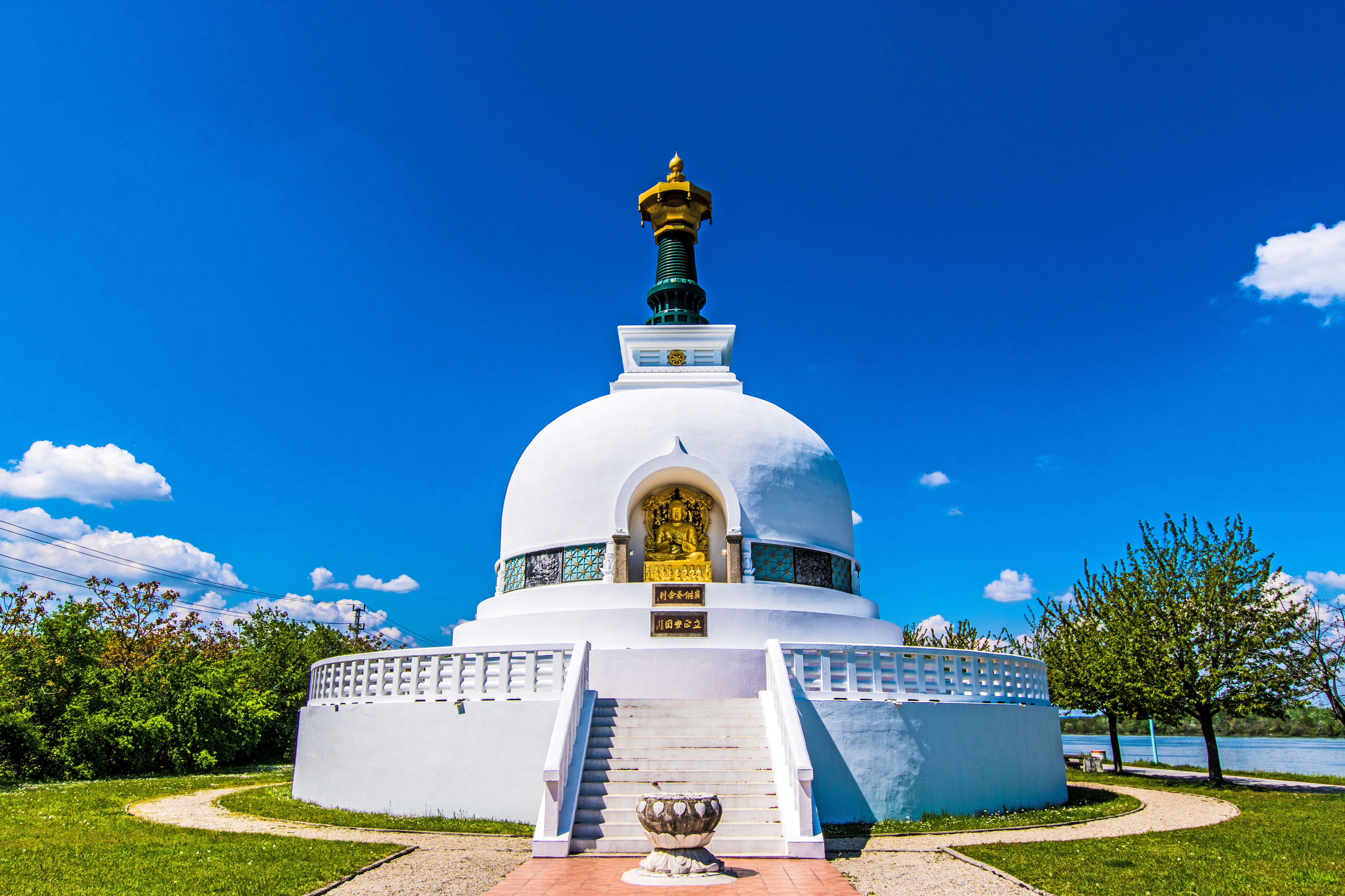 Friedenspagode Wien, buddhistische Stupa